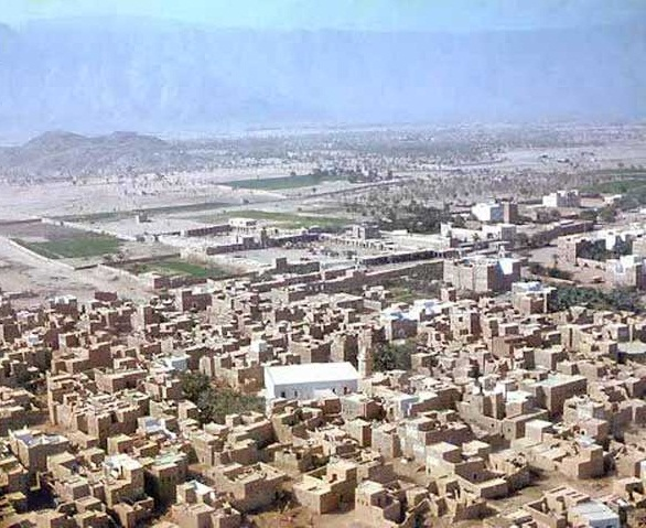 مدينة بيحان عام 1967م